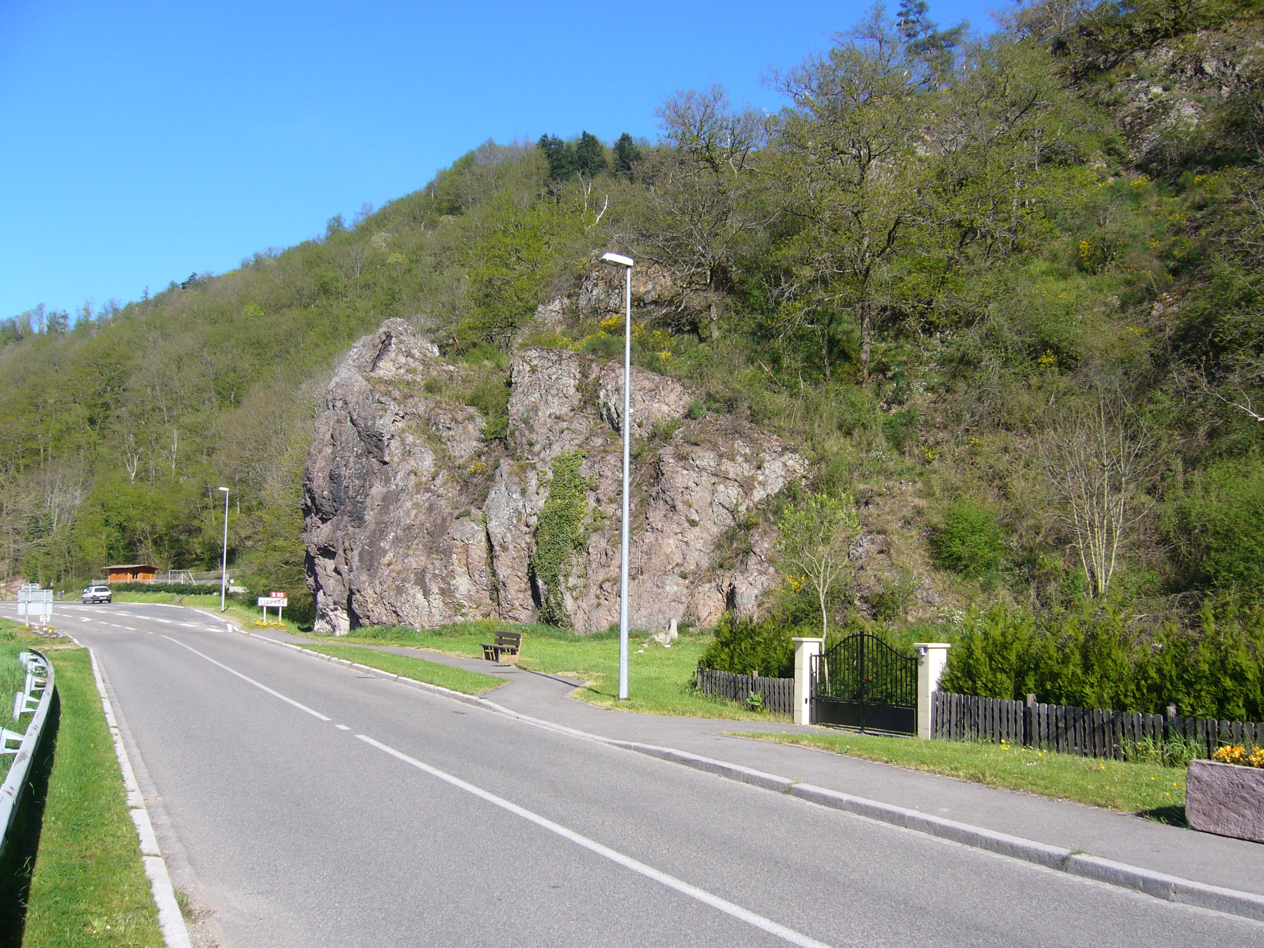 Lièpvre 373.JPG